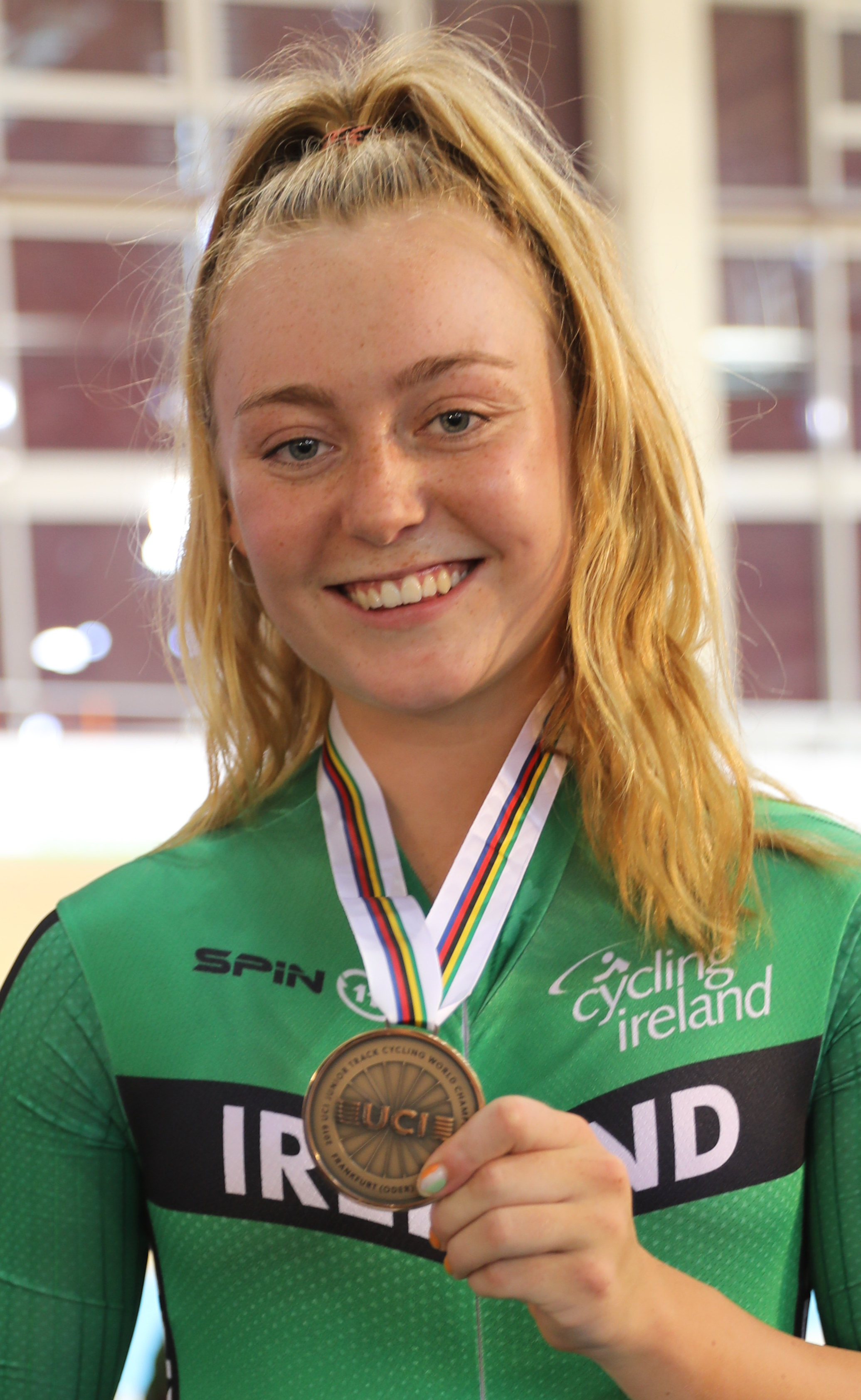 Lara Gillespie, irische Radsportlerin, mit der Bronzemedaille in der Einerverfolgung bei der Junioren-WM 2019